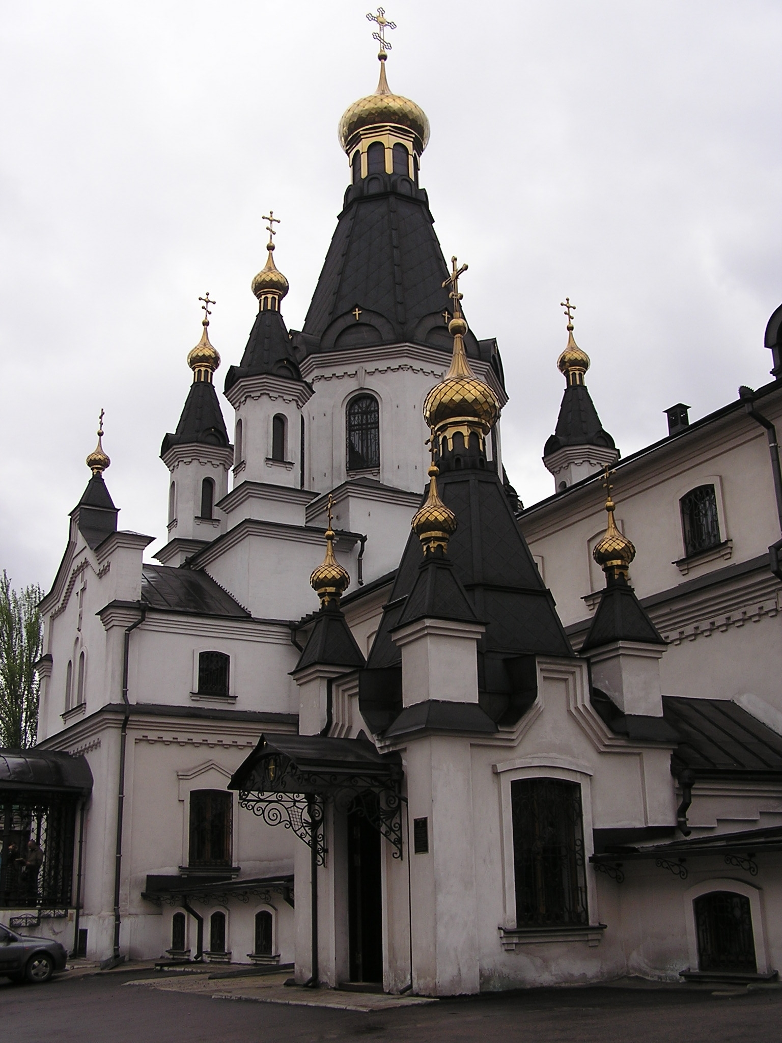 Донецк. Свято-Николаевский кафедральный собор